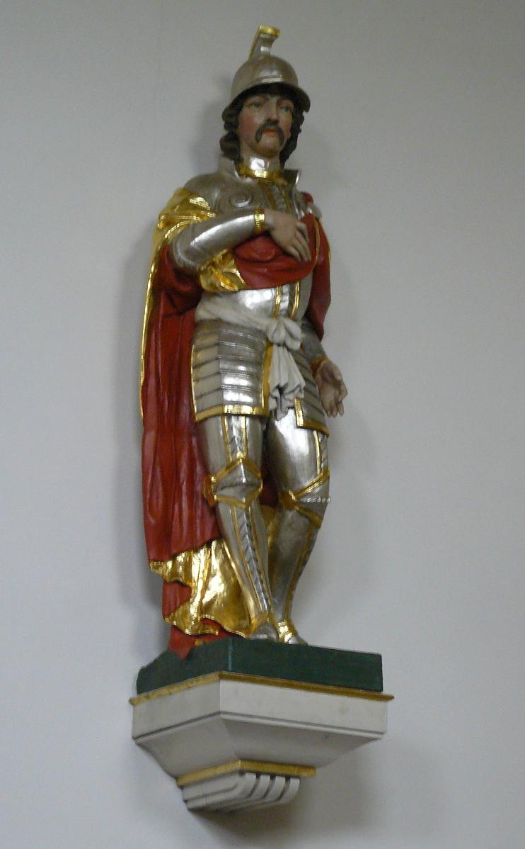 Heiliger Achatius, Statue des Heiligen in St. Achatius, Mainz-Bretzenheim (Zahlbach)